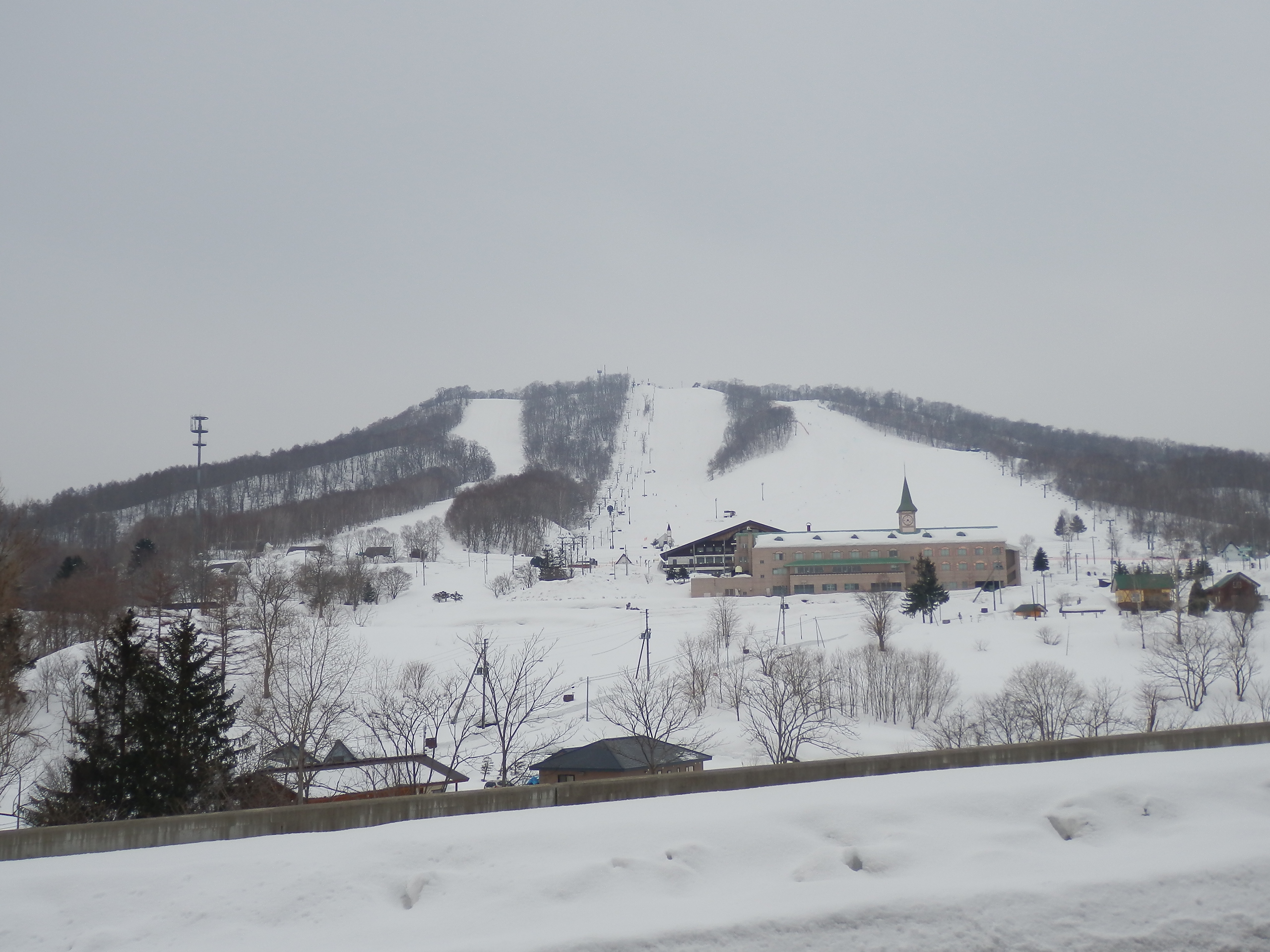 かもい岳国際スキー場イーストゲレンデ全景